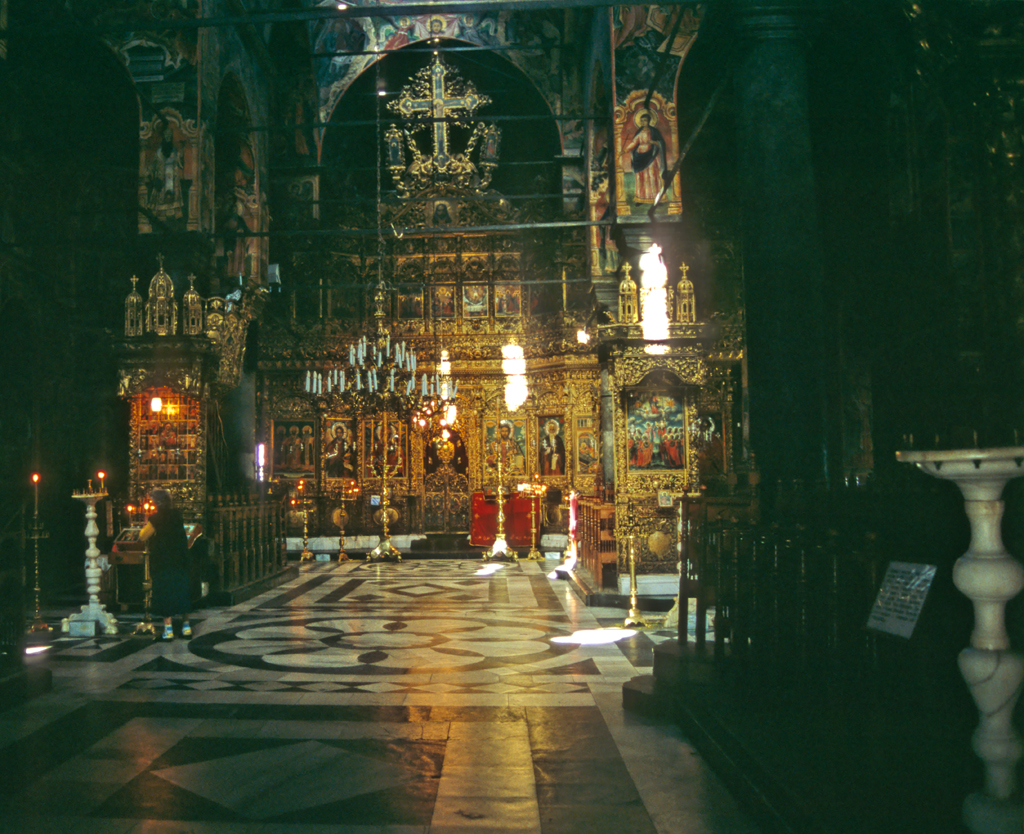 In church of Rila Monastery (Iglesia de la Natividad de la Virgen, Monasterio de Rila), Bulgaria